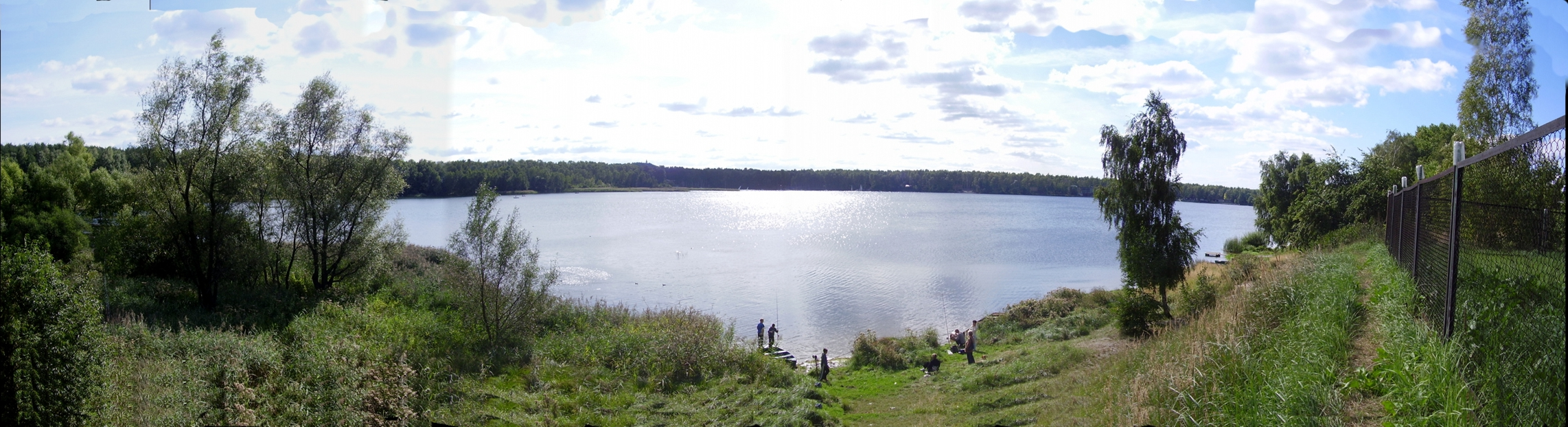 Panorama zbiornika Pogoria